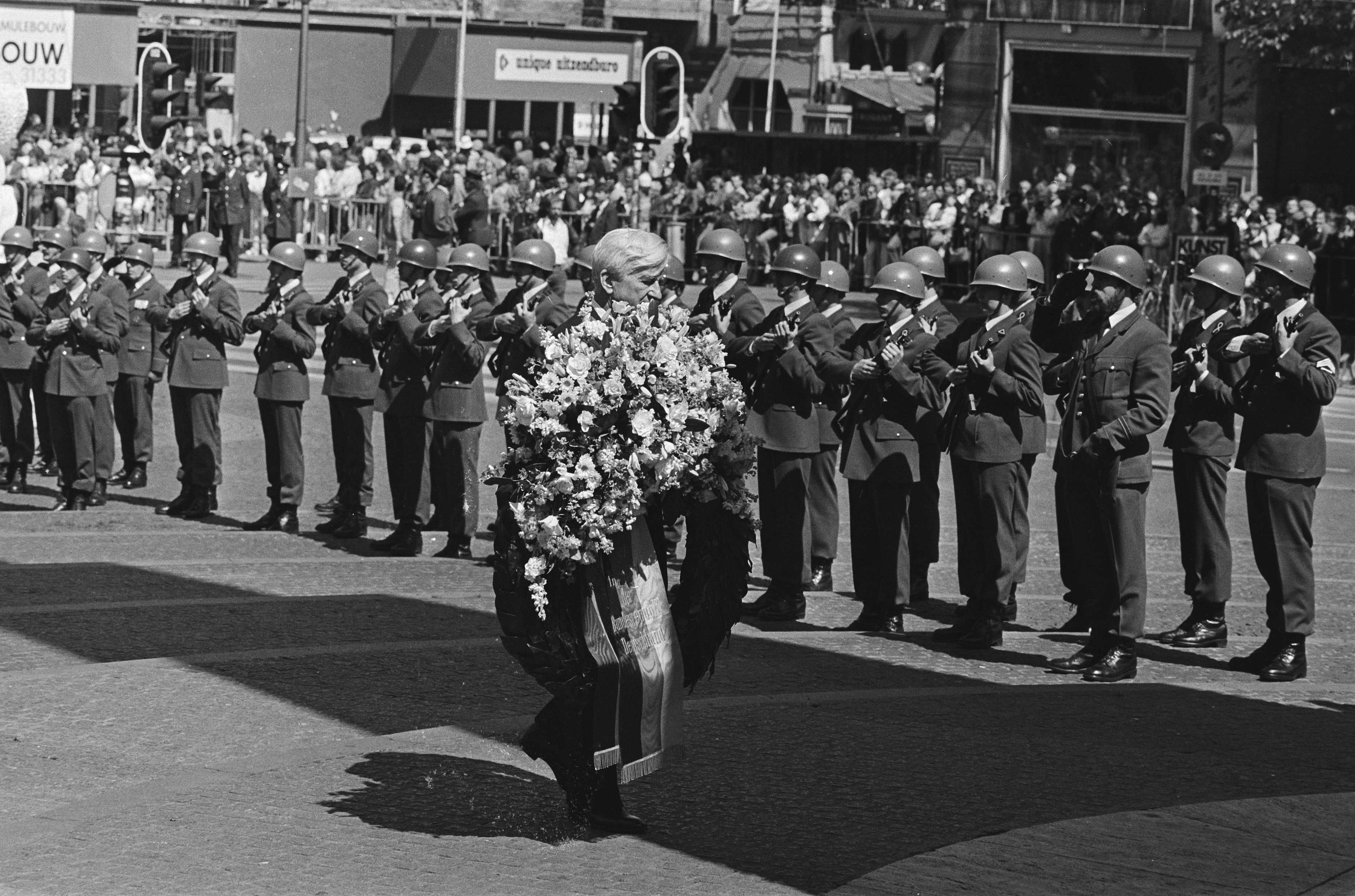 Collectie / Archief : Fotocollectie Anefo Reportage / Serie : [ onbekend ] Beschrijving : Staatsbezoek van president Von Weizsäcker van West Duitsland; president Von Weizsäcker legt een krans bij het Nationaal Monument op de Dam Datum : 30 mei 1985 Locatie : B.R.D., Duitsland Trefwoorden : koninginnen, kransleggingen, monumenten, presidenten, staatsbezoeken Persoonsnaam : Weizsäcker, Richard von Fotograaf : Bogaerts, Rob / Anefo, [onbekend] Auteursrechthebbende : Nationaal Archief Materiaalsoort : Negatief (zwart/wit) Nummer archiefinventaris : bekijk toegang 2.24.01.05 Bestanddeelnummer : 933-3407